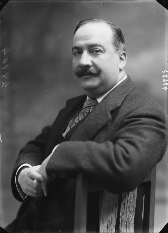 Luigi Lucatelli